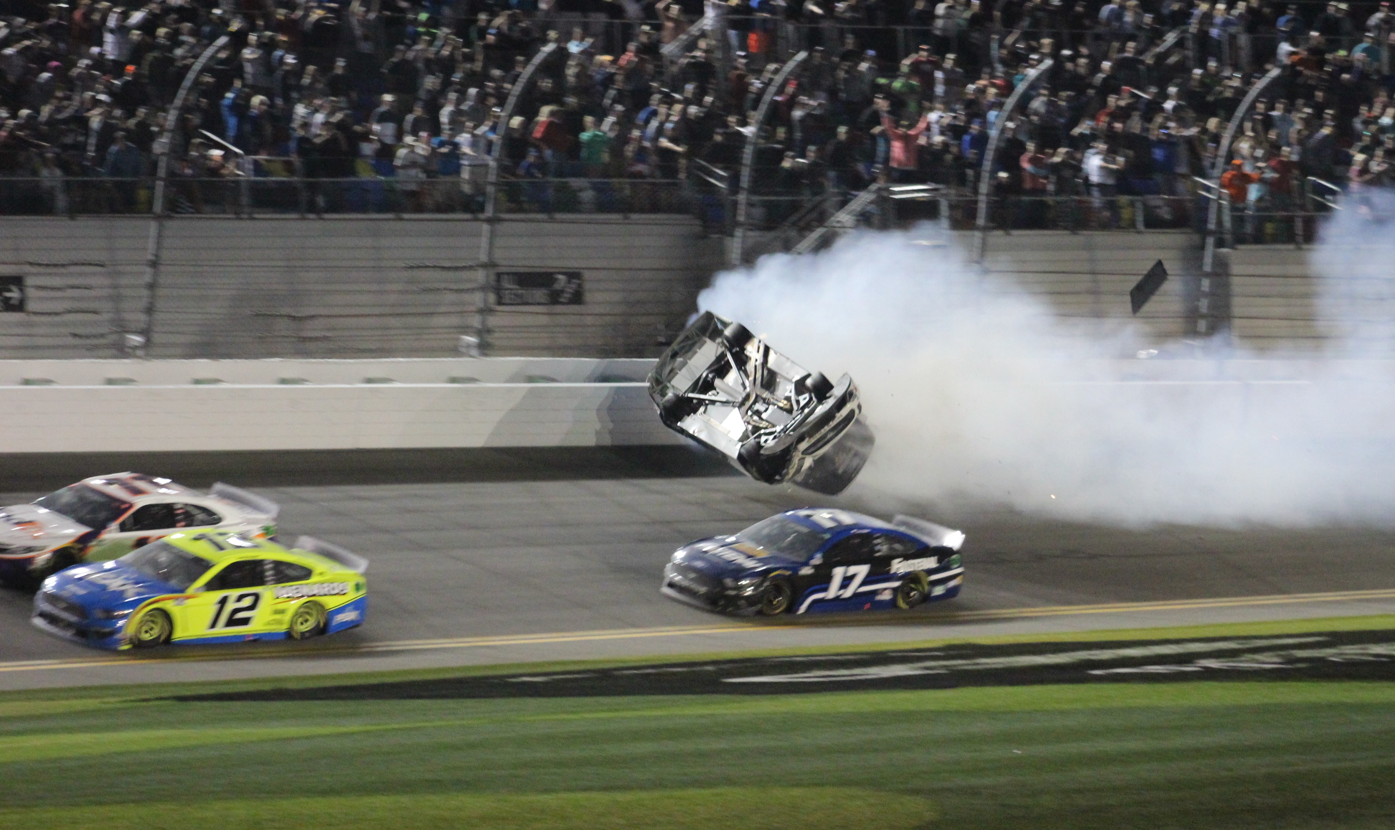 Daytona Speekweeks, 2020